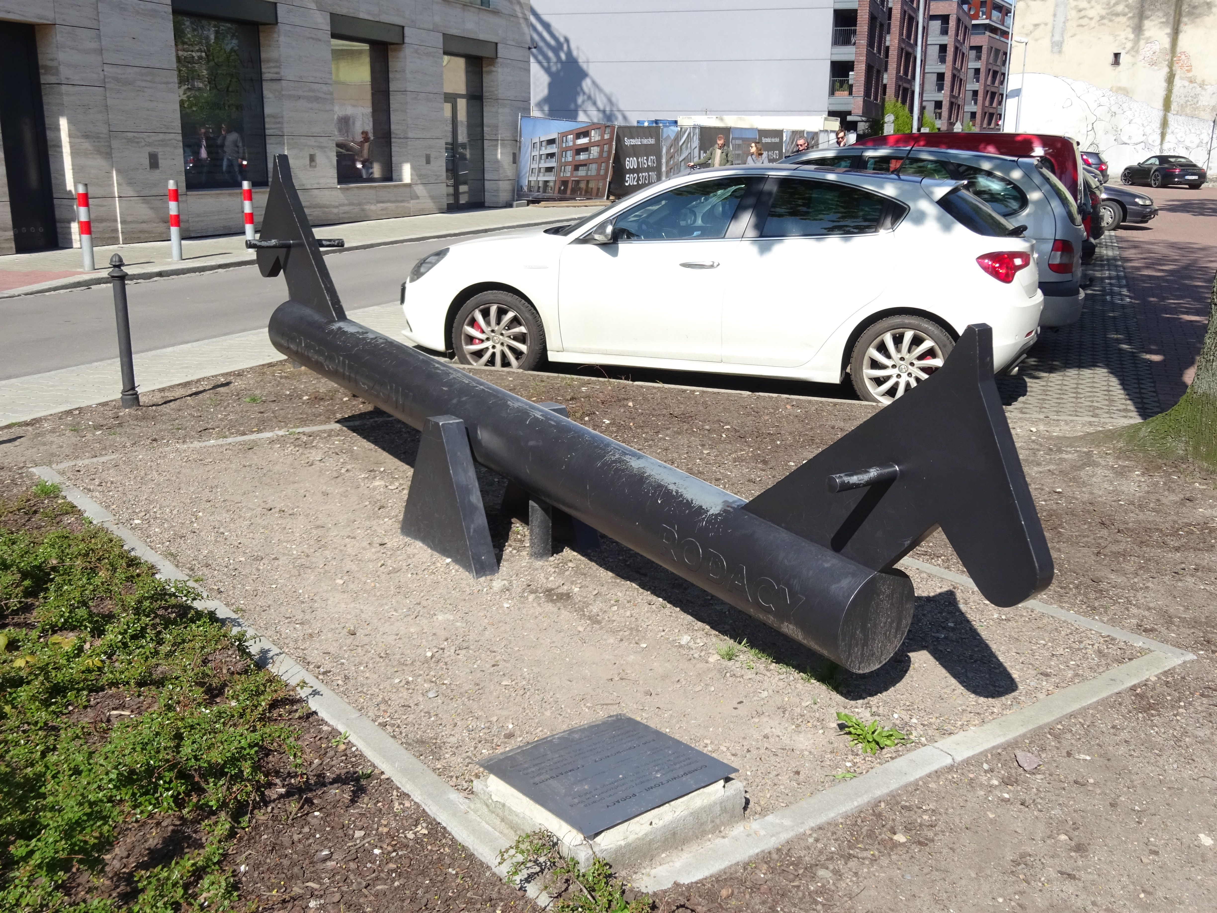 Huśtawka-pomnik upamiętniający Witolda Gombrowicza (Gombrowiczowi Rodacy) na ul. Józefińskiej w Krakowie-Podgórzu. 2017